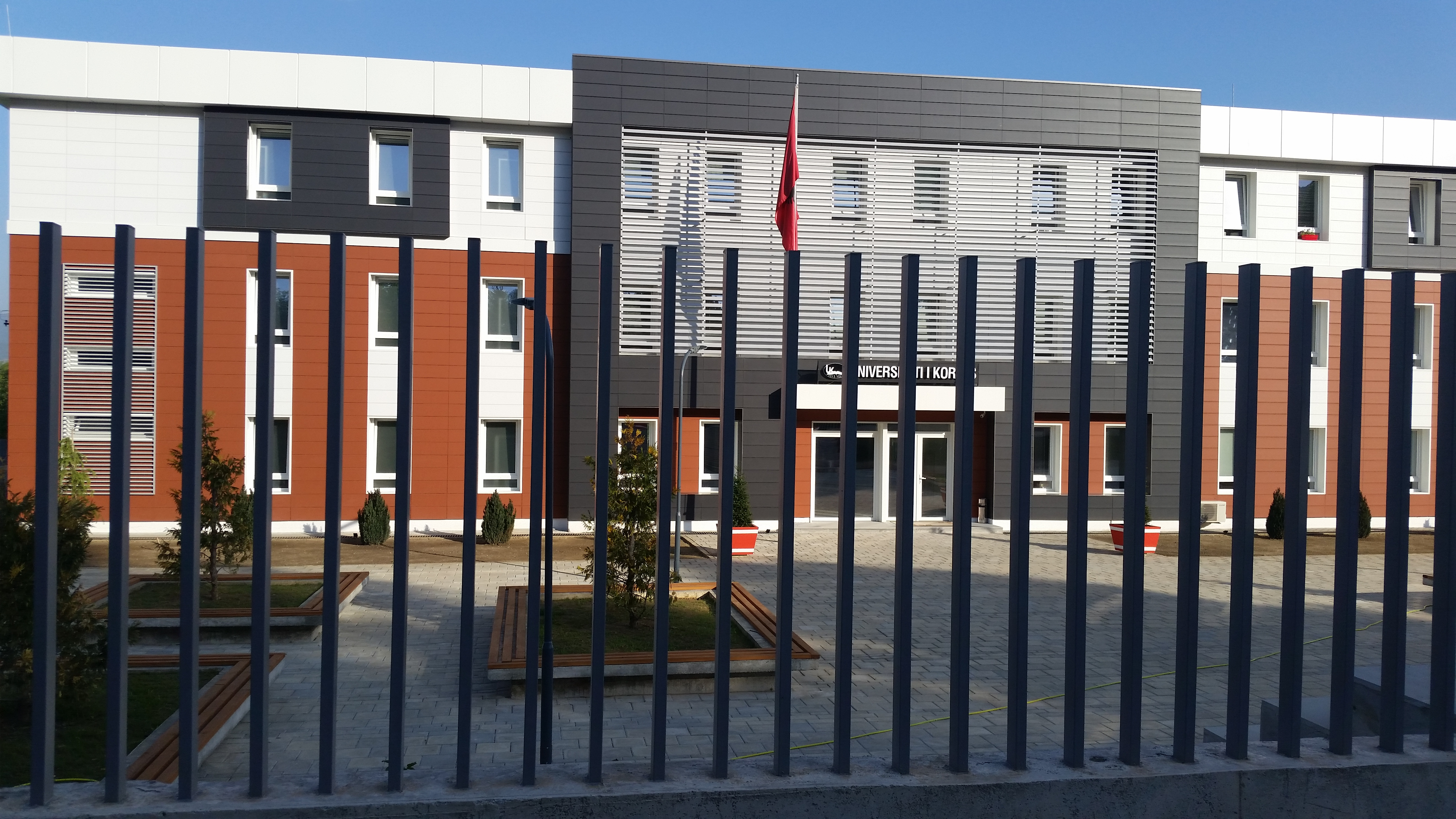 Universiteti Fan S. Noli i Korçës